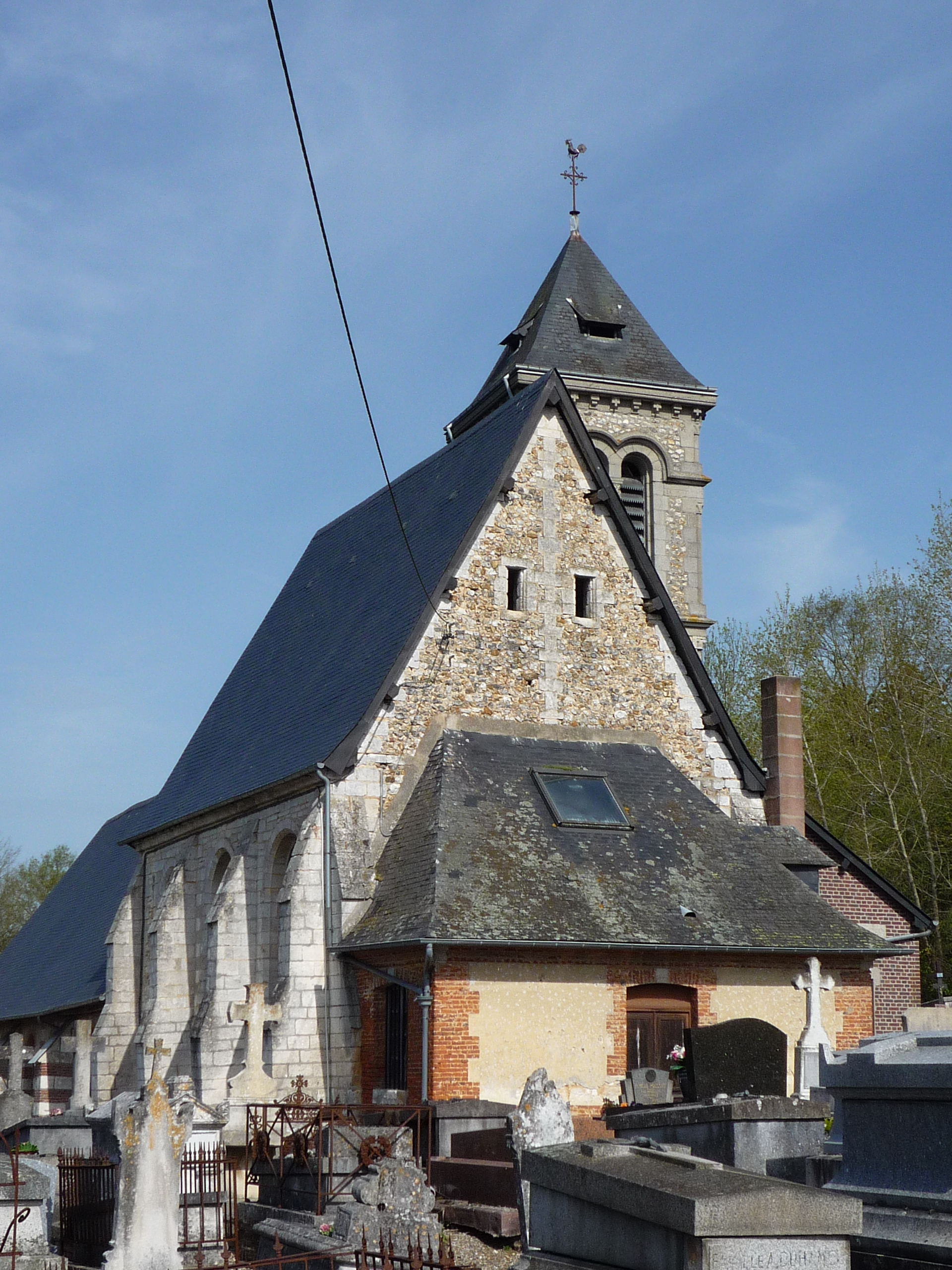 Eglise de Saint-Georges-du-Vievre